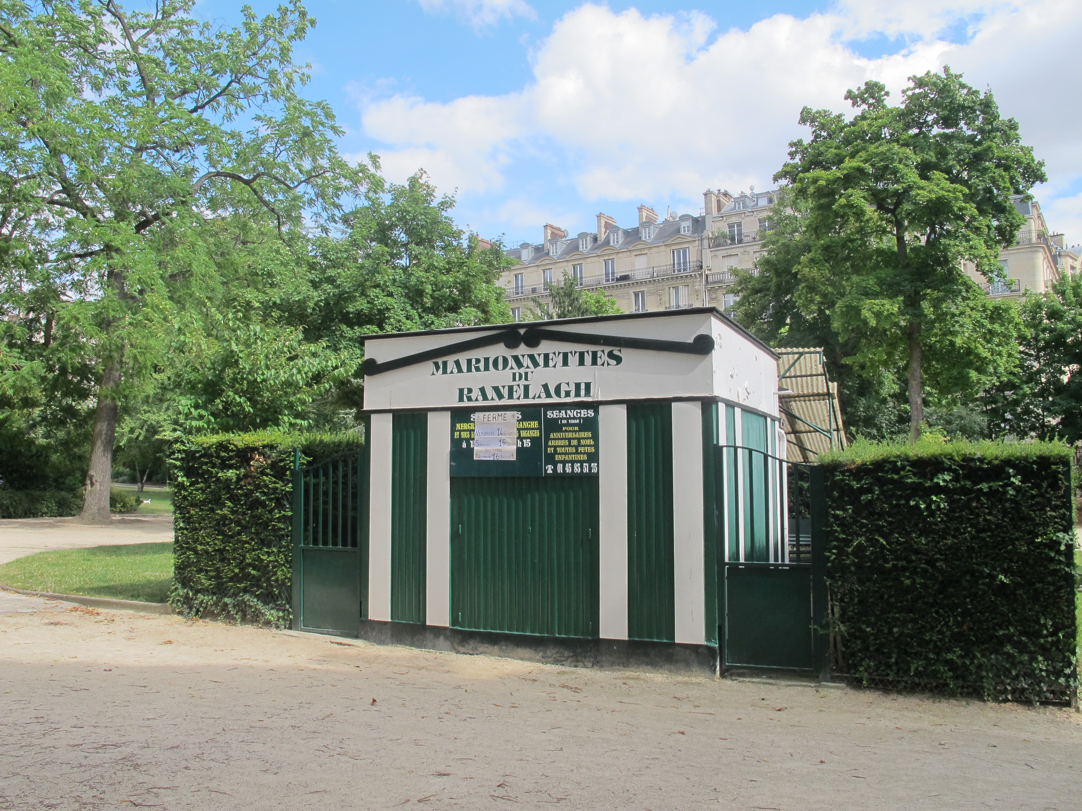 Théâtre de marionnettes du jardin du Ranelagh (Paris, 16e).